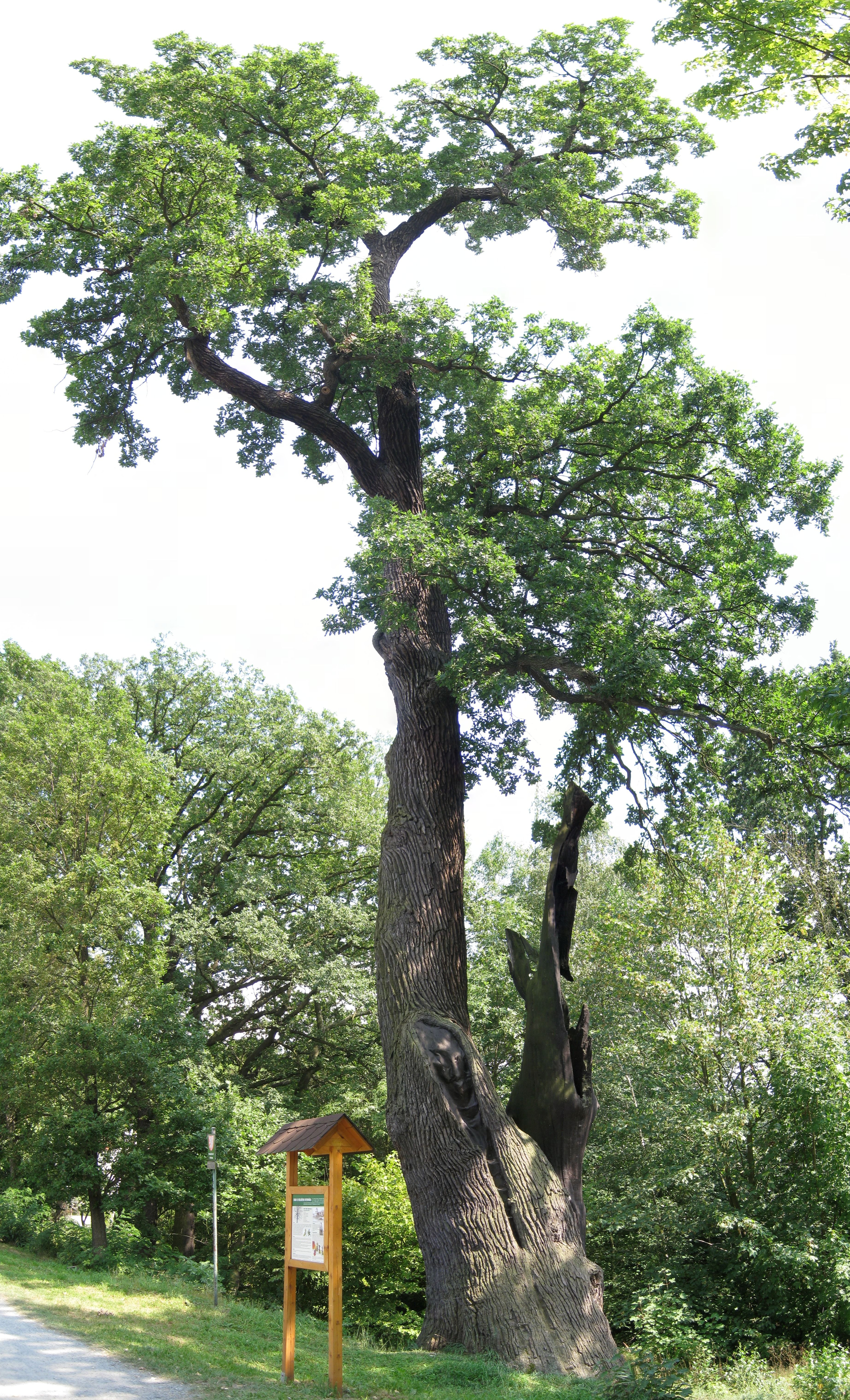 Dub u Velkého rybnika - 400 let starý památný strom na hrázi Velkého Bolevckého rybnika v Plzni. Obvod kmene je 705 cm. Strom je jedním ze tří zde stojících státem chráněných stromů jako přírodní výtvor.